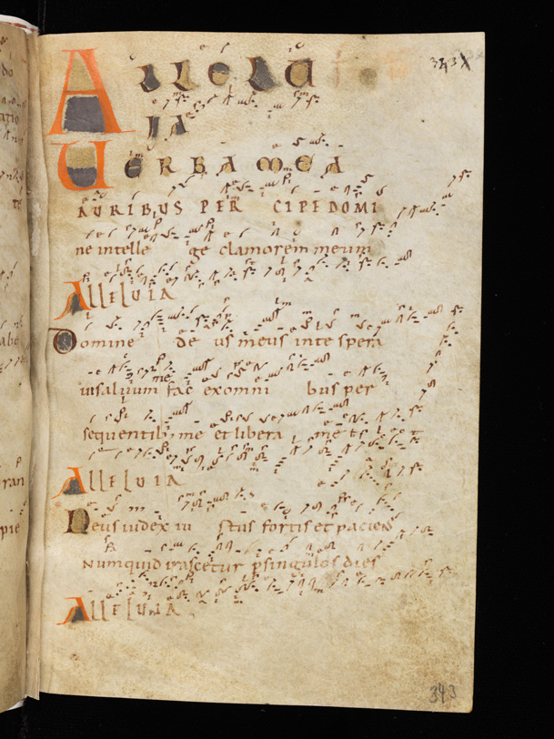 Cod. Eins. 121, Beginn der Halleluja-Verse mit Neumen, S. 343